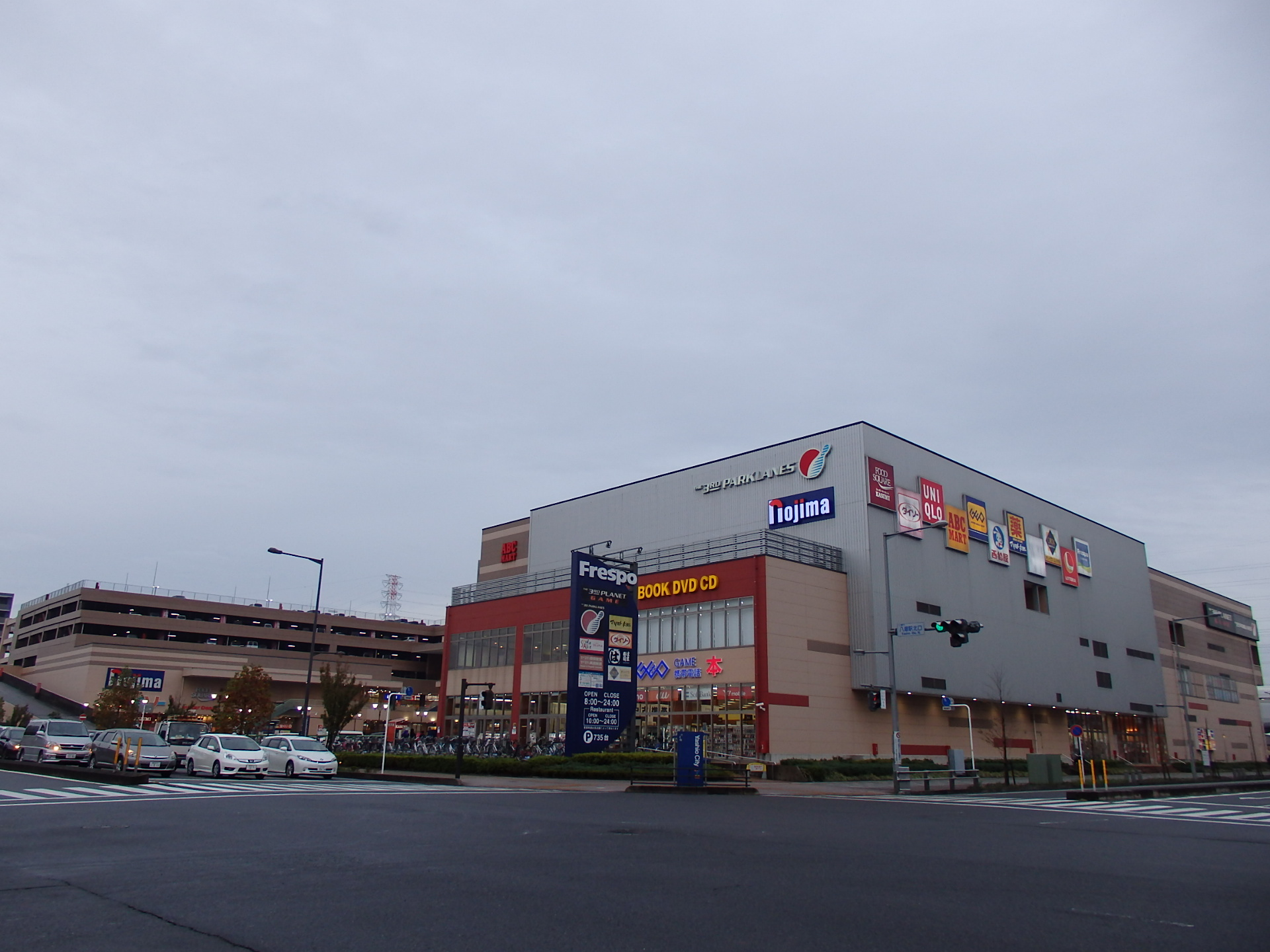 フレスポ八潮